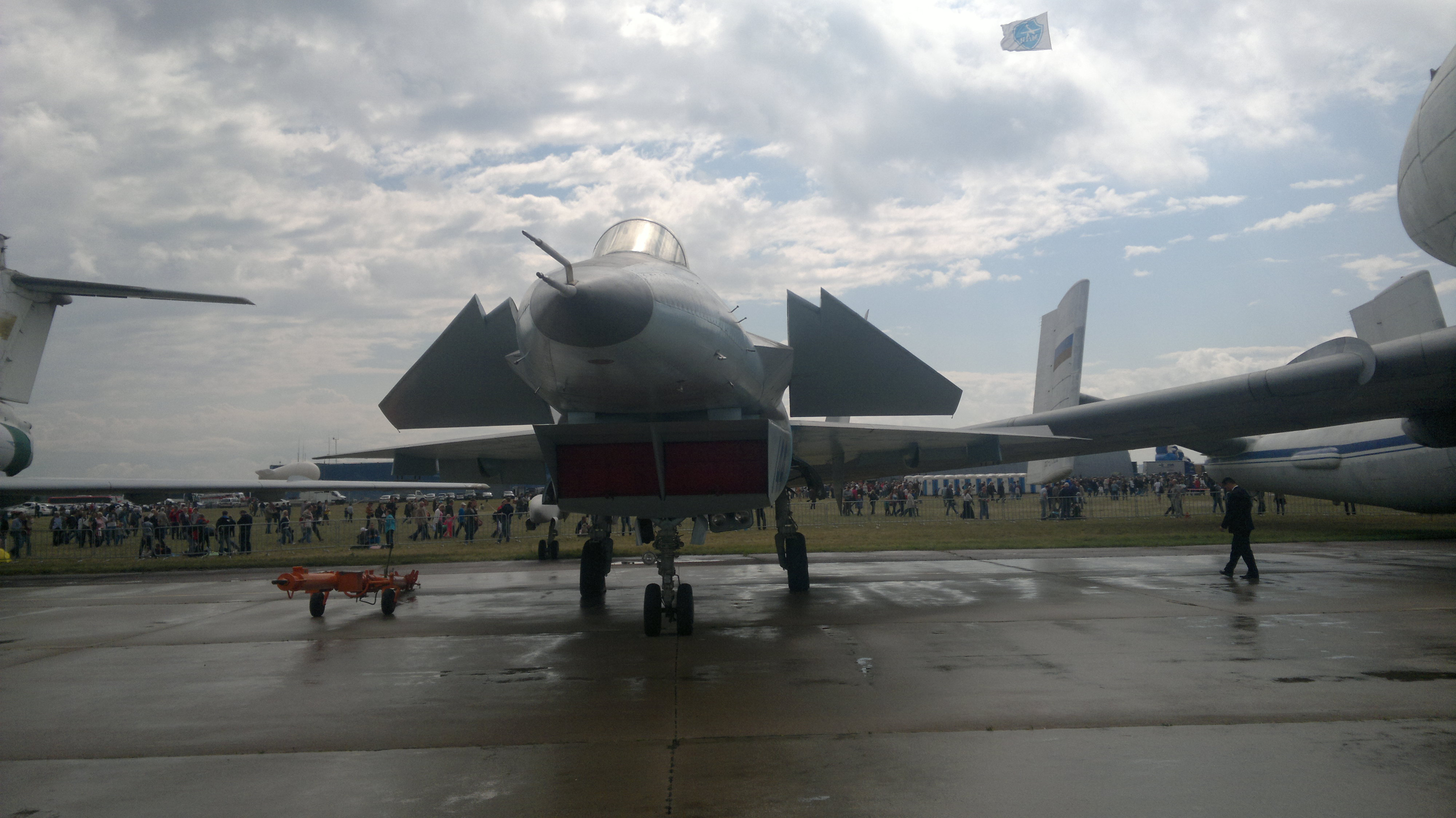 MiG144 front